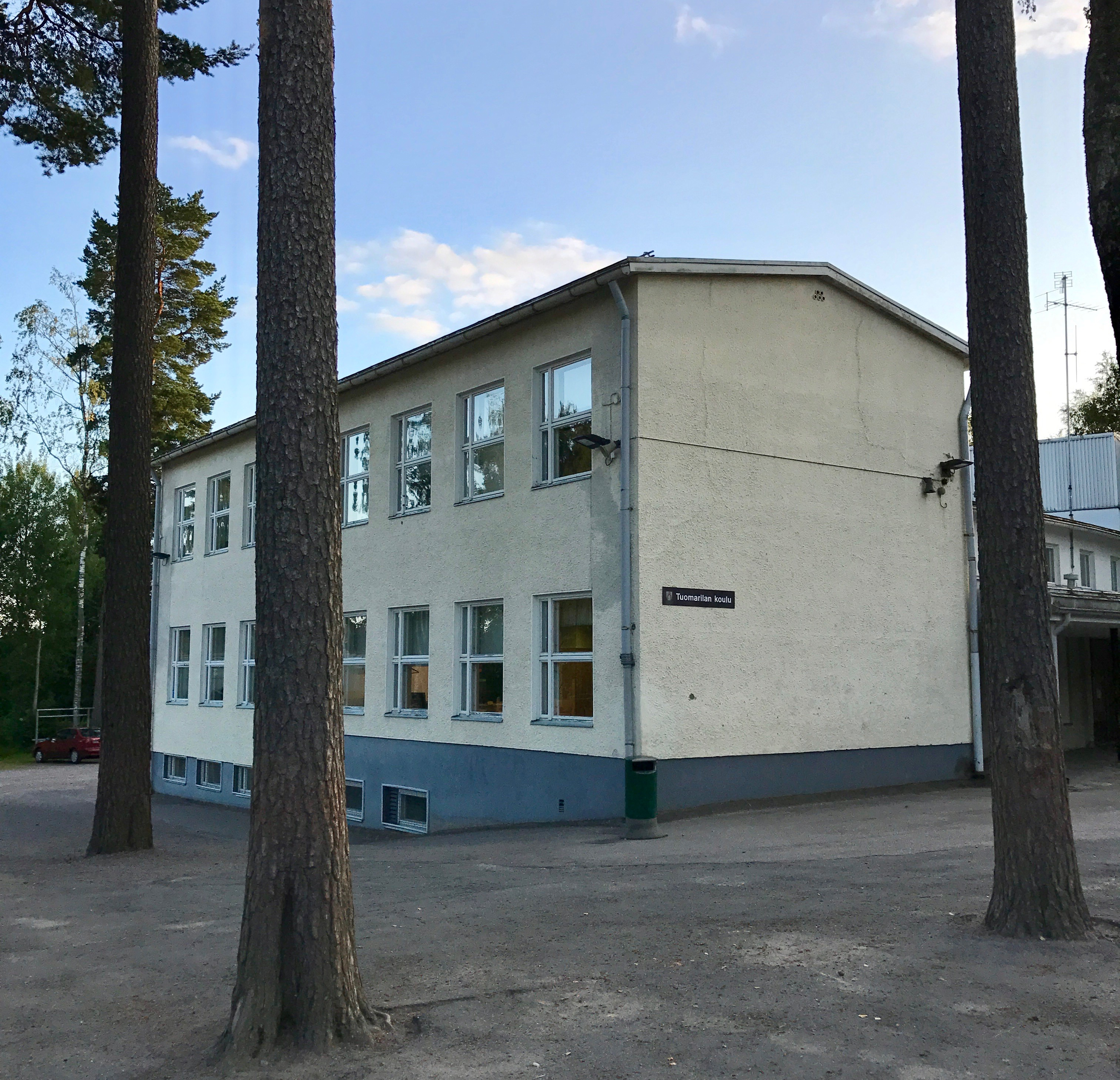 Tuomarilan koulu Espoossa.